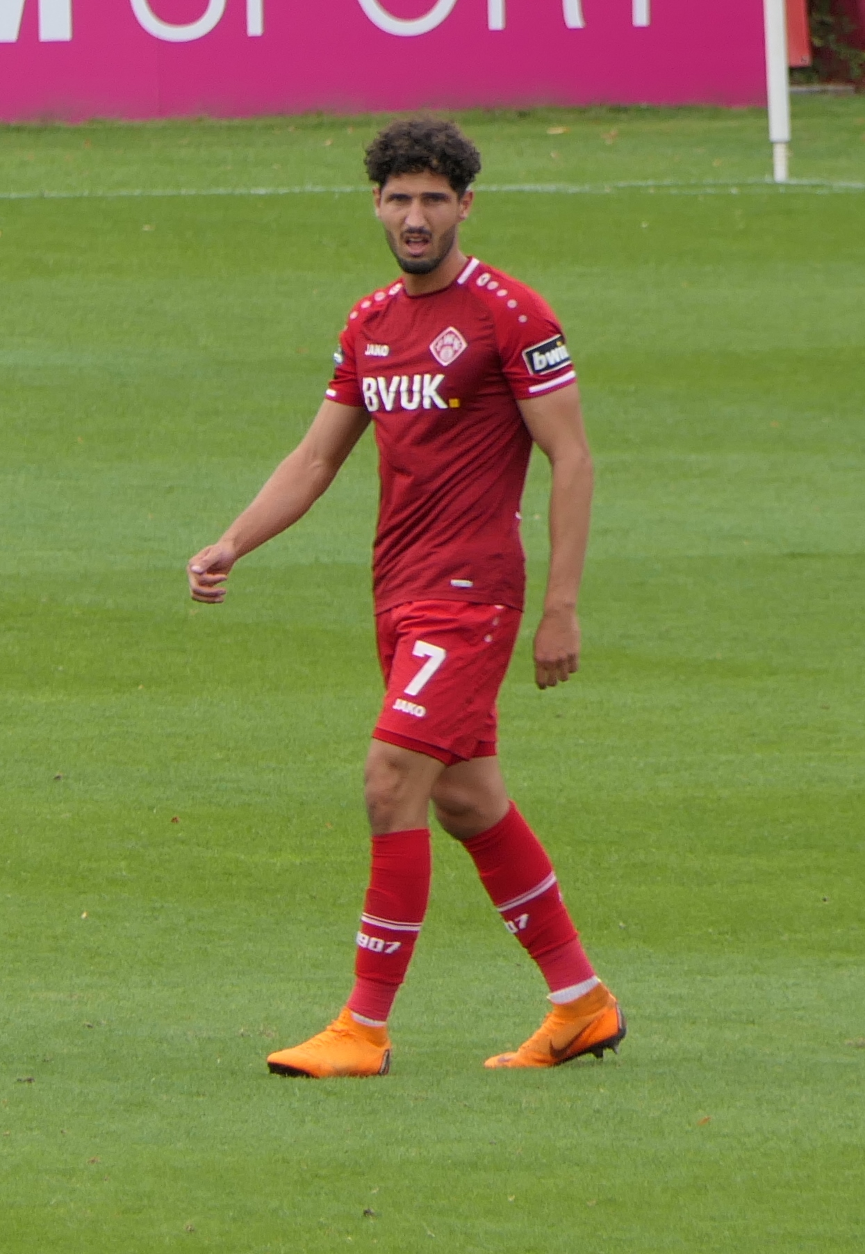 Der Fussballprofi Fabio Kaufmann im Trikot der Würzburger Kickers beim Heimspiel gegen Eintracht Braunschweig am 22.09.2018.